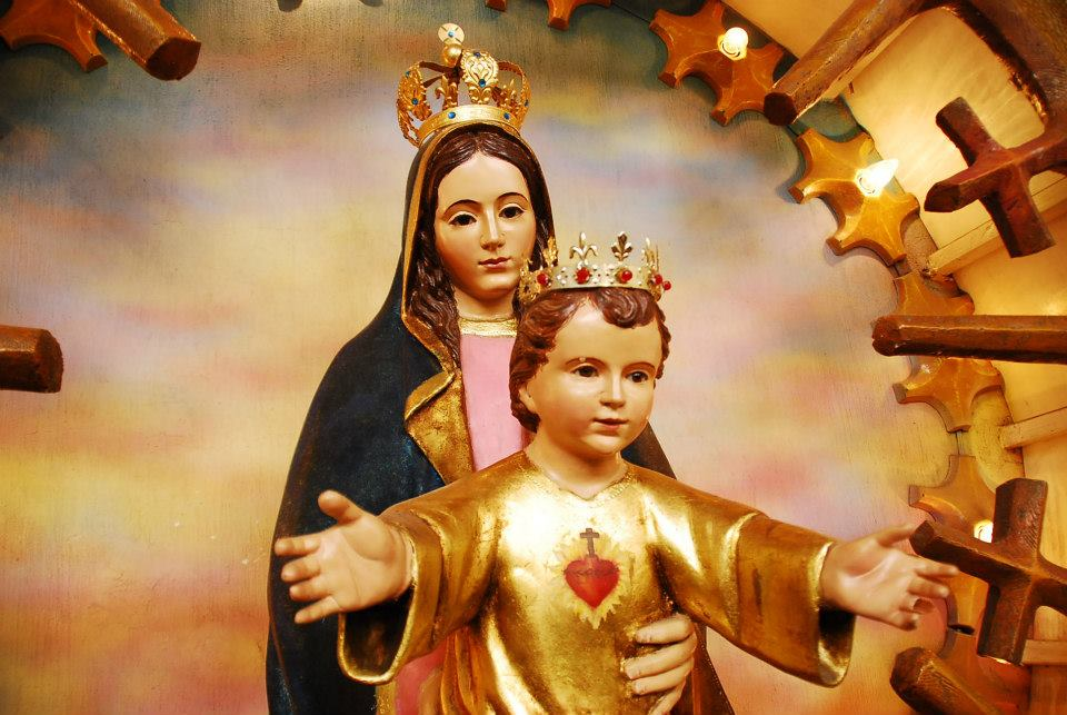 Imagen de Medio Cuerpo de Nuestra Señora de la Aurora